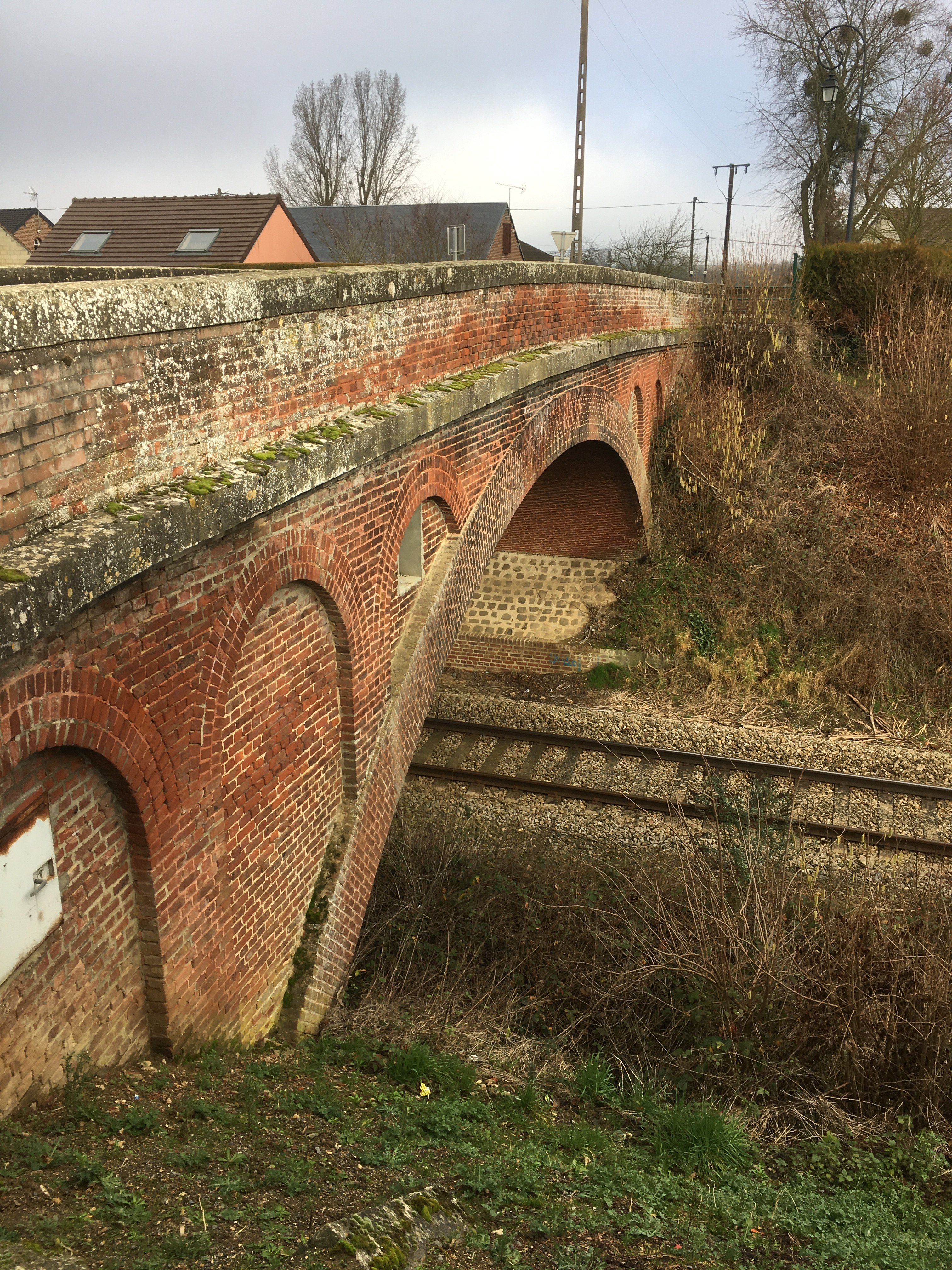 Vue du pont enjambant la voie SNCF à Moyenneville (Oise)